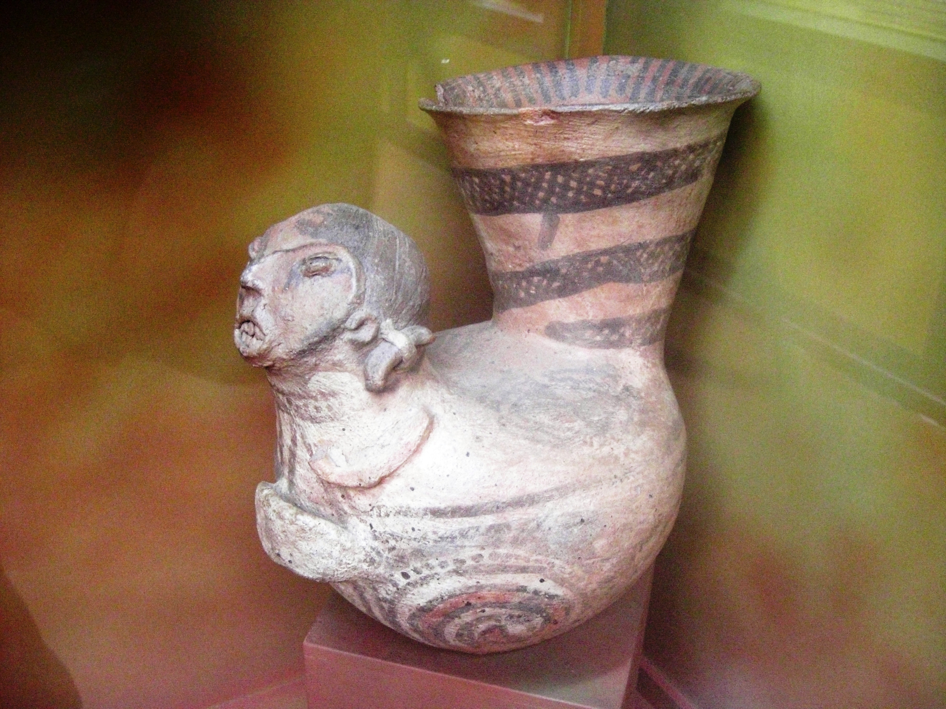 Detalle de la vitrina dedicada a la cultura del valles calchaquíes .Museo de la Plata. Argentina